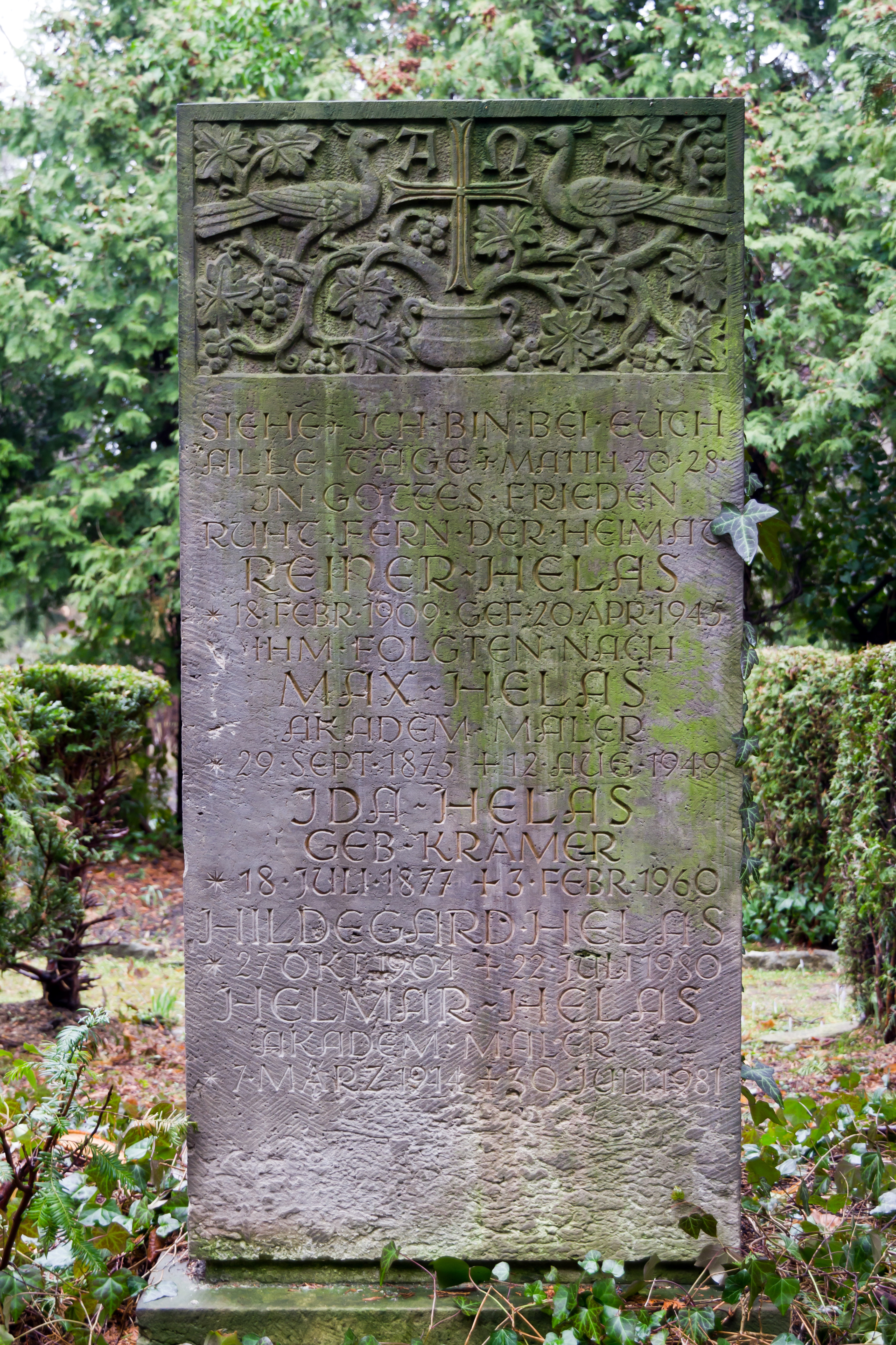 Grabstein der Familie Helas in Dresden-Striesen